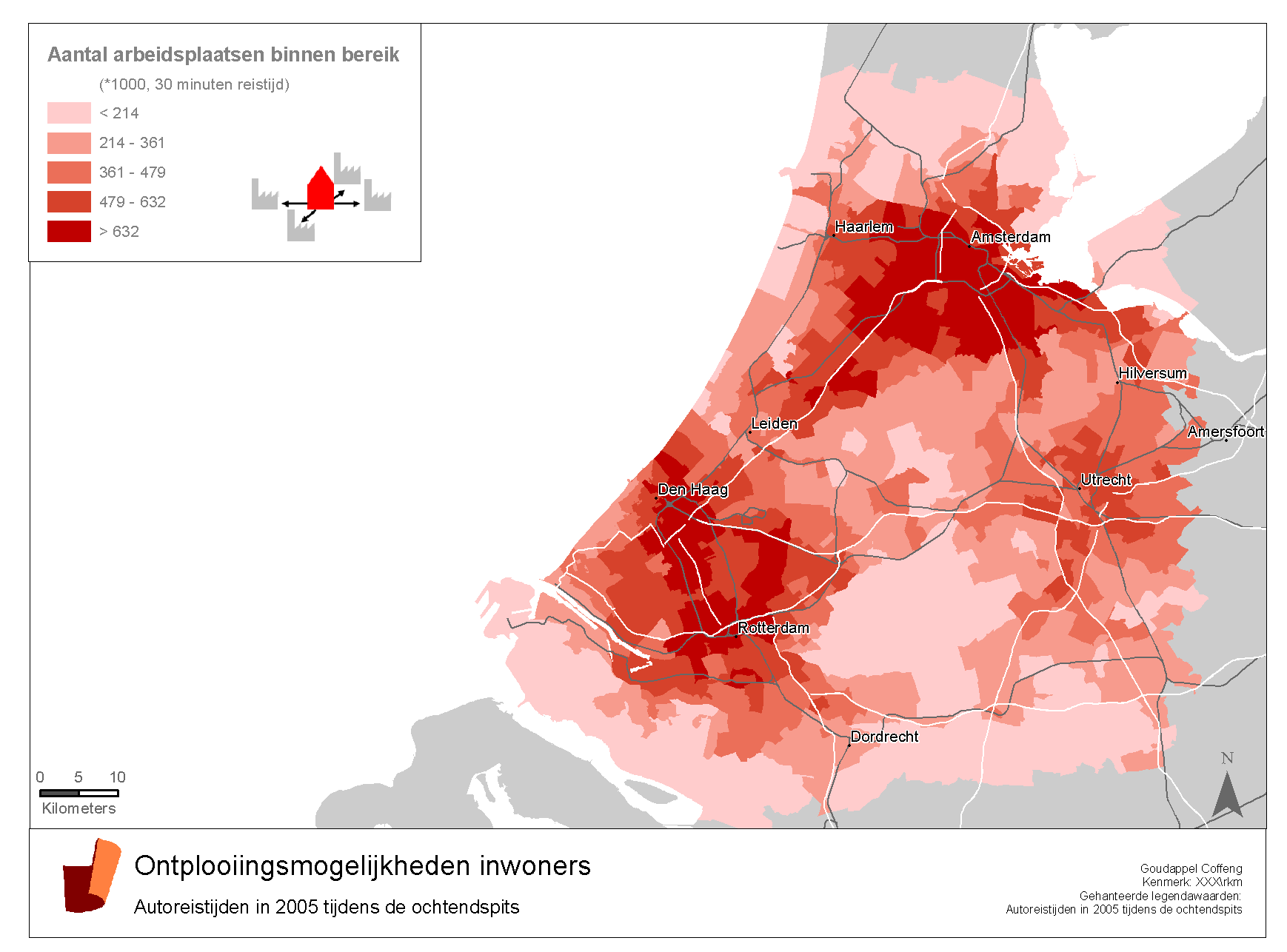 Voorbeeld van een bereikbaarheidskaart